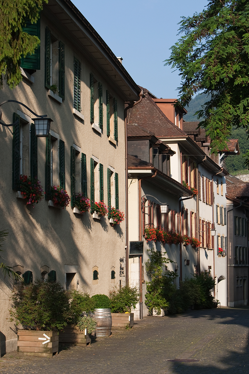 Dorfgasse in Twann bei der Kirche: Aebischerhaus Dorfgasse 54